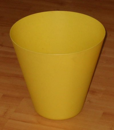 Prullenbak ontwerp rond 1996, eigen foto ter beschikking gesteld onder GNU FDL